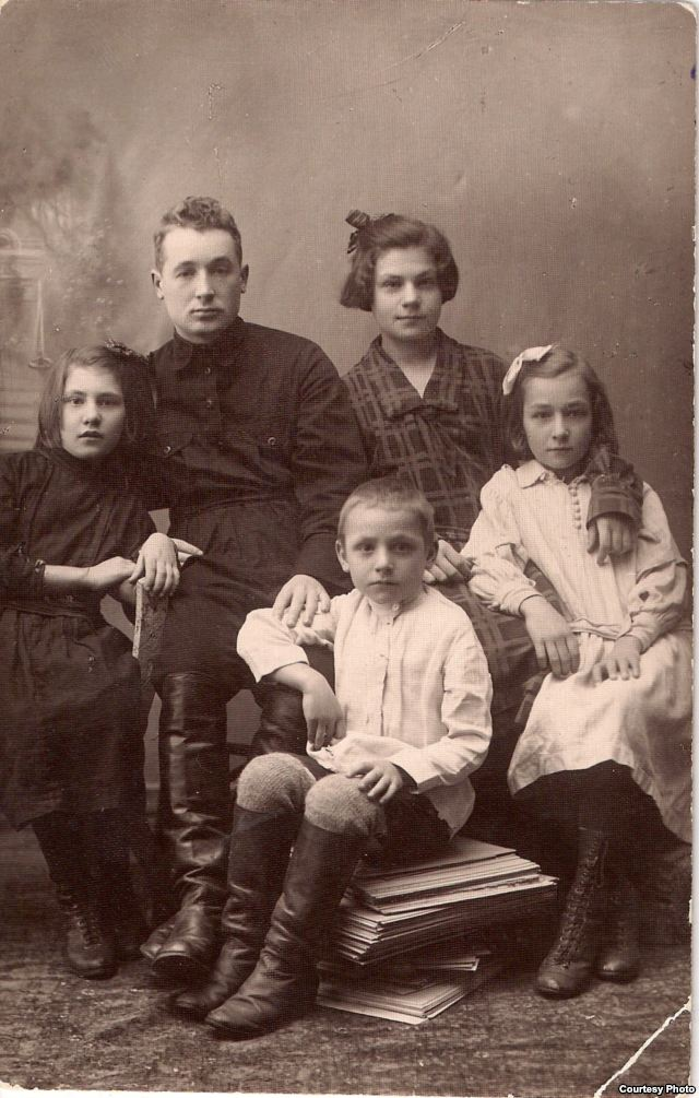 Беларуская (тарашкевіца): Кузьма Чорны зь першай жонкай Ідай Чырвань, сёстрамі й братам. Канец 1925 г. З фондаў БДАМЛМ.